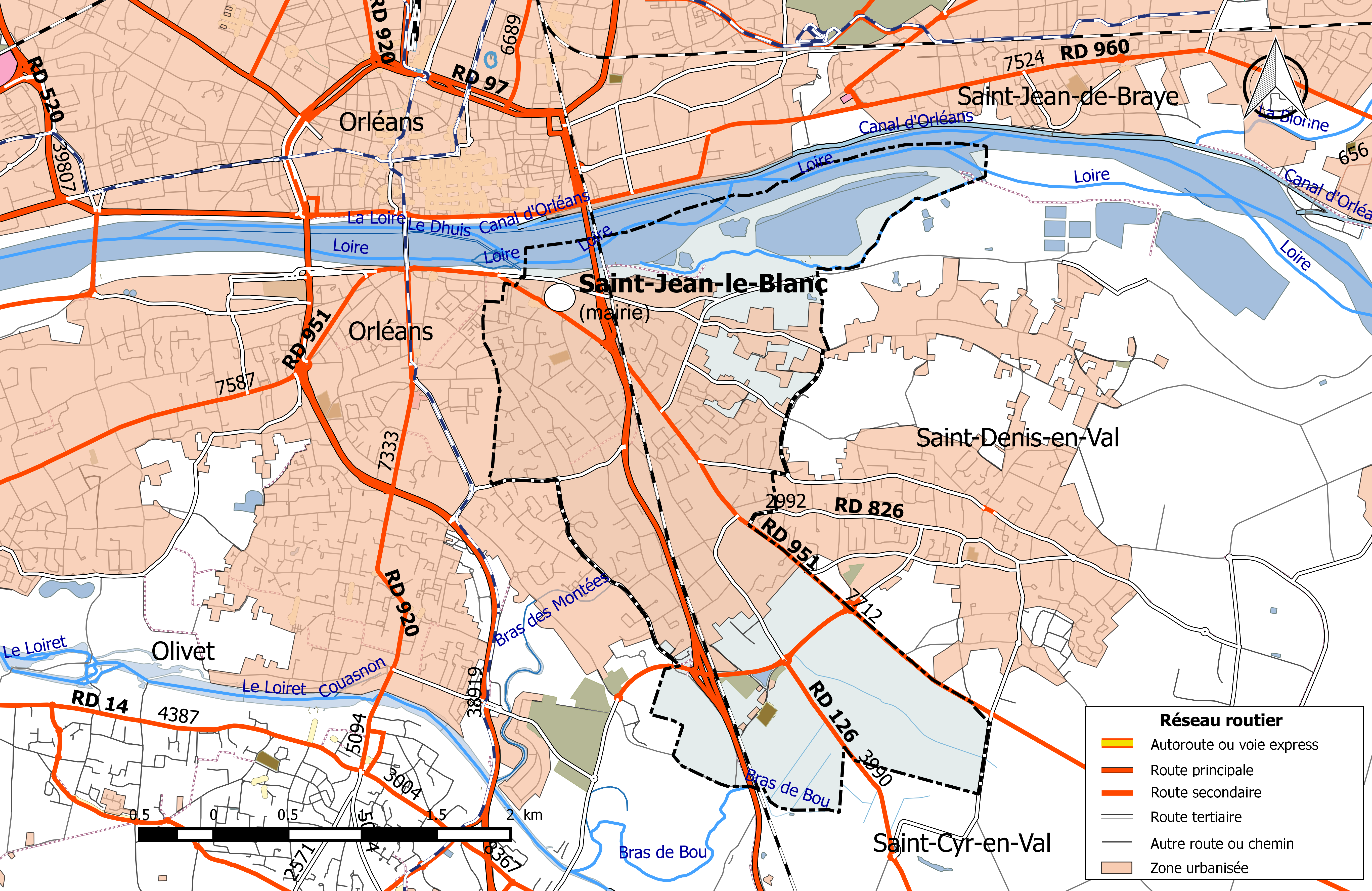 Carte du réseau routier de la commune de Saint-Jean-le-Blanc (Loiret).